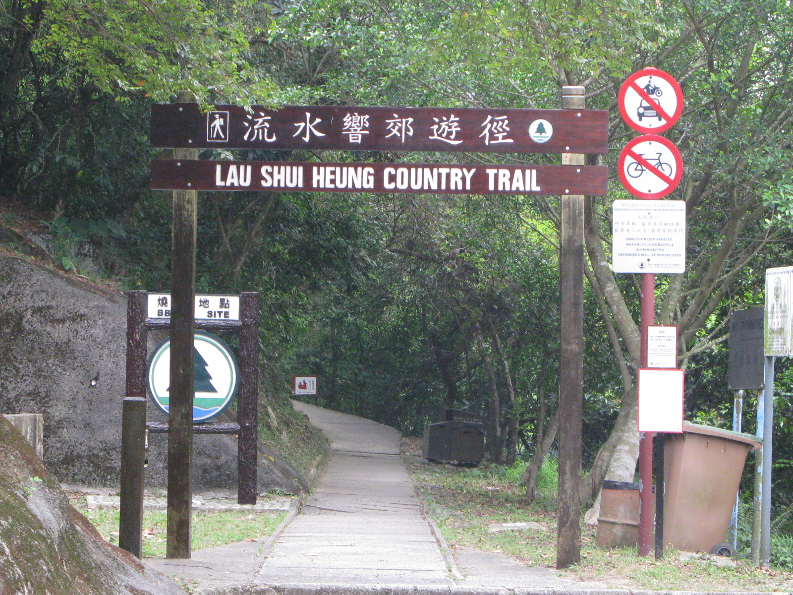 中文（香港）: 香港新界流水響郊遊徑入口